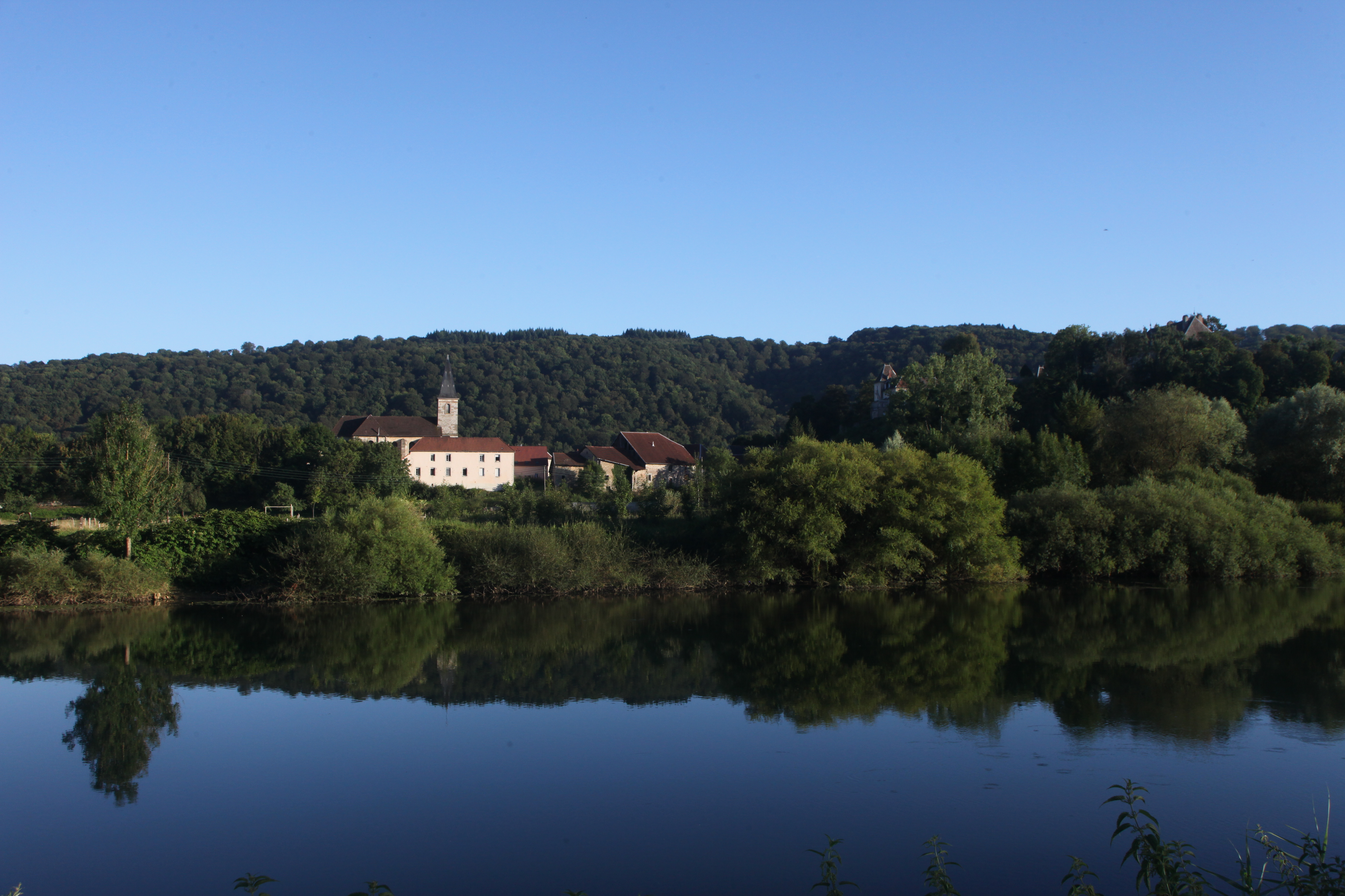 Vue de Vaire-Arcier (Doubs).